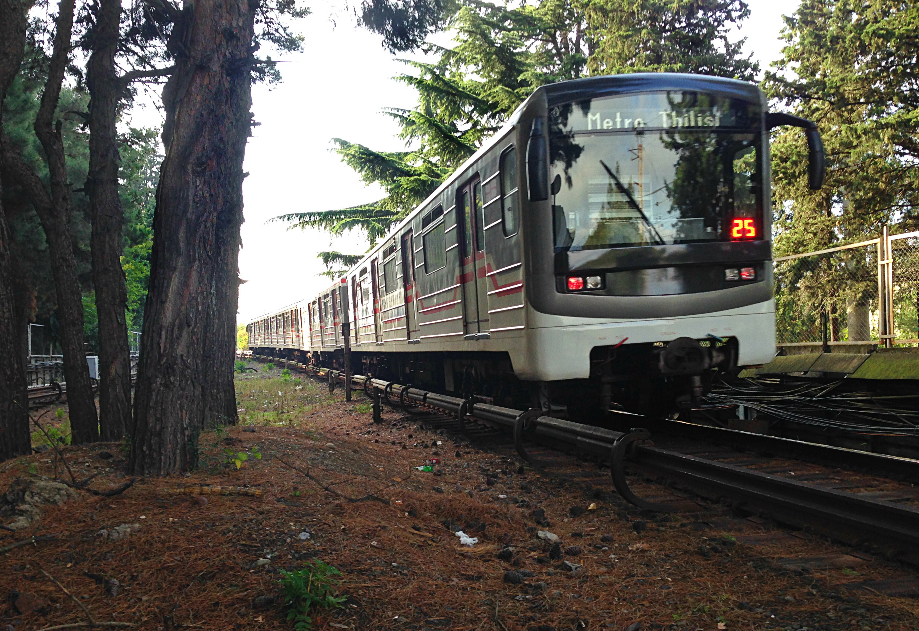 IMG_9552d